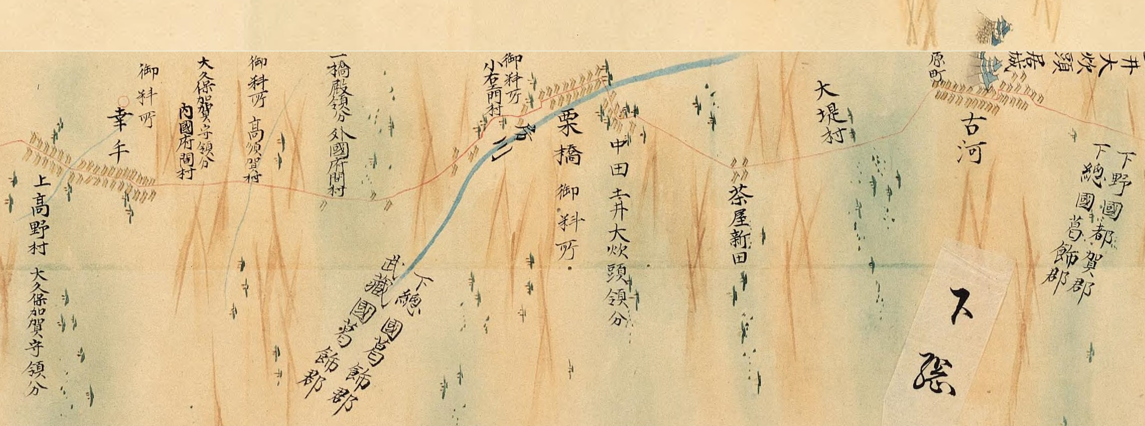 〔大日本沿海輿地全図 〕. 第８７図 下野・下総・武蔵(武蔵・草加・下総・古河・下野・小山)および第８８図をもとに、改変。 栗橋・中田周辺の状況。